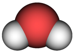 Water molecule